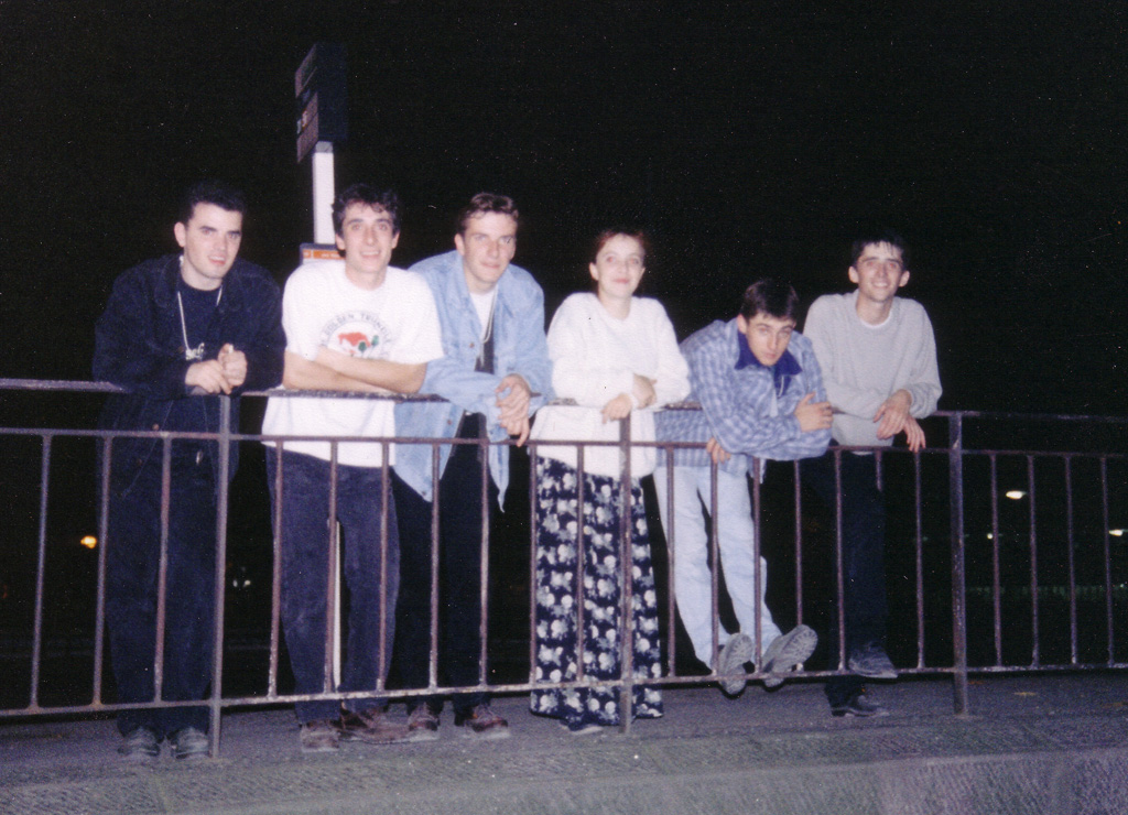 Emsaverien à Nantes après les 25 ans de Tri Yann à l'usine Lu. (Jérôme Duclos, Gino Joubert, Guillaume Blain, Claire Leyzour, Guillaume Hallereau, Guillaume Bassompierre)